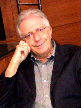 Manuel Lucas en Sevilla